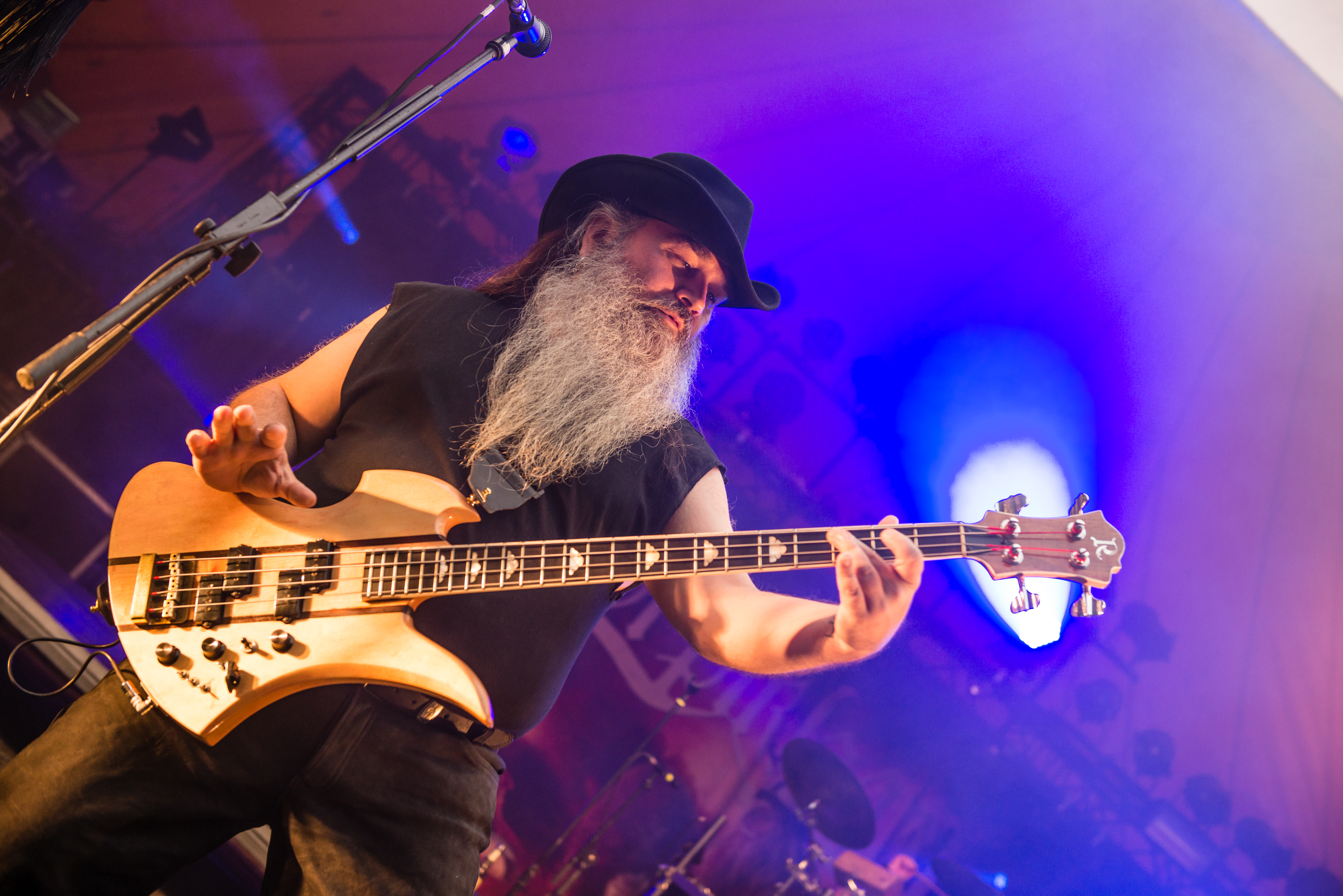 'Feuertal 2014 - Wuppertal': 'Korpiklaani'